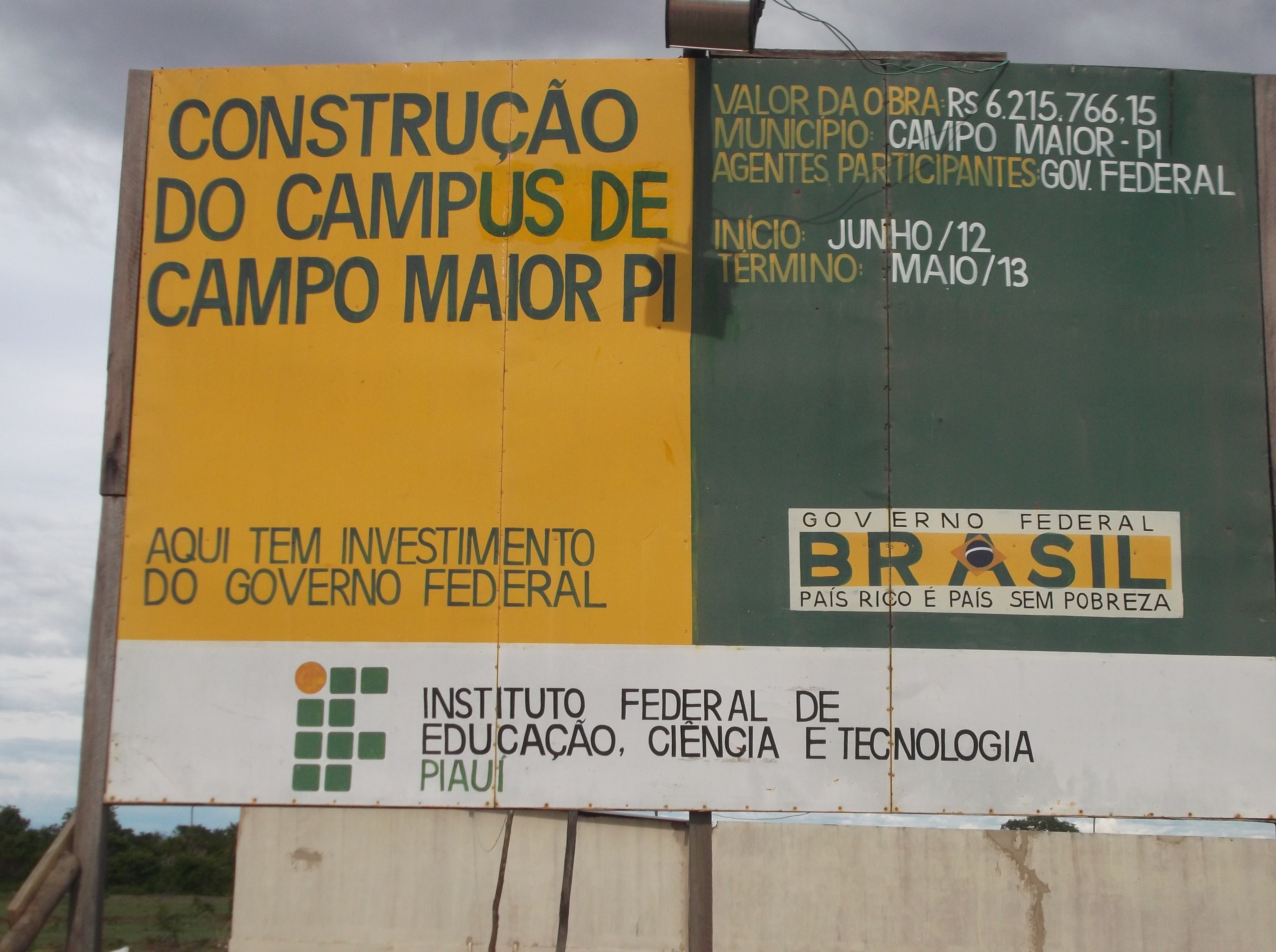 Placa do governo federal do Brasil da construção de um IFPI em Campo Maior, Piauí, Brasil.